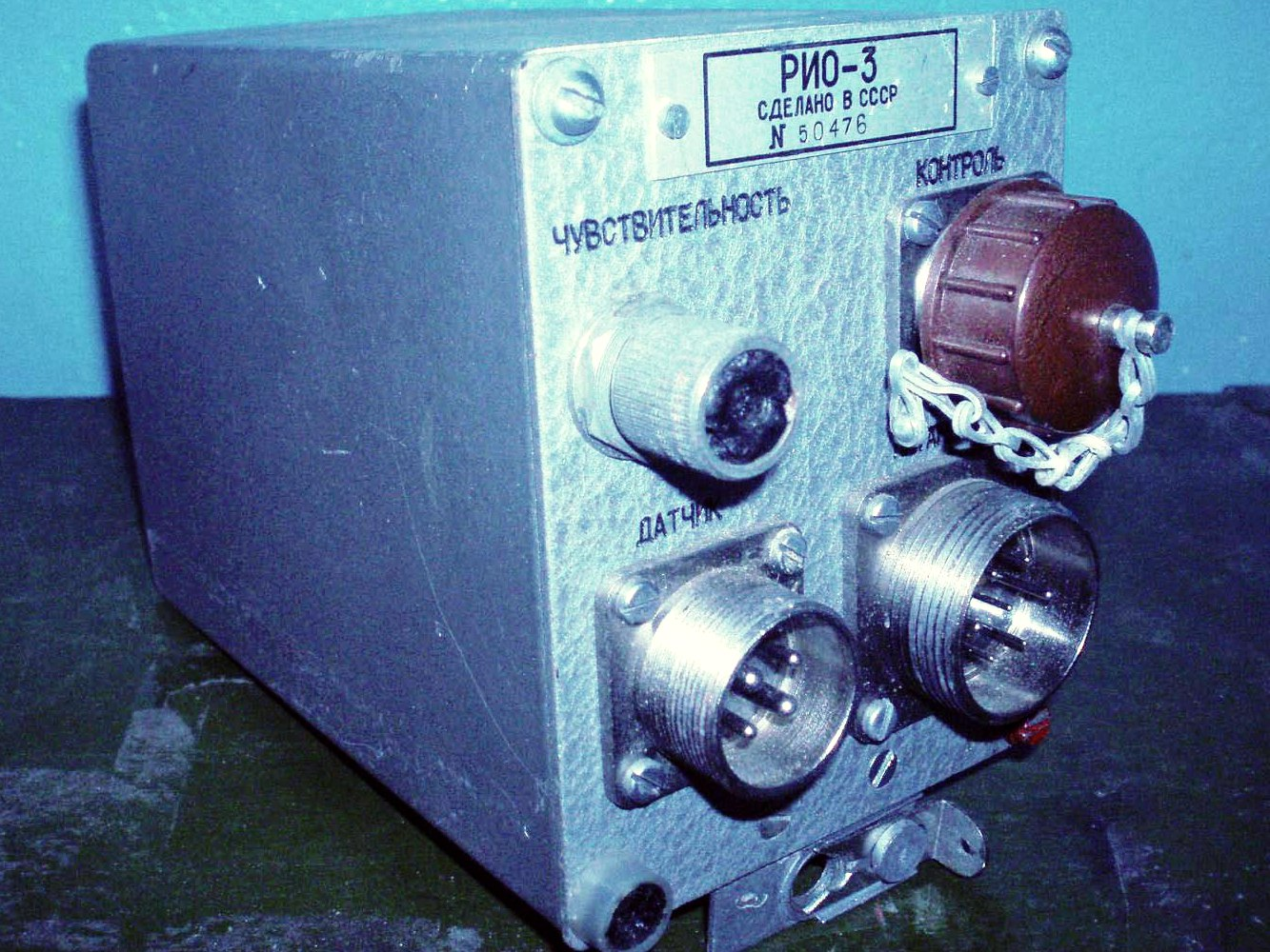 Блок РИО-3